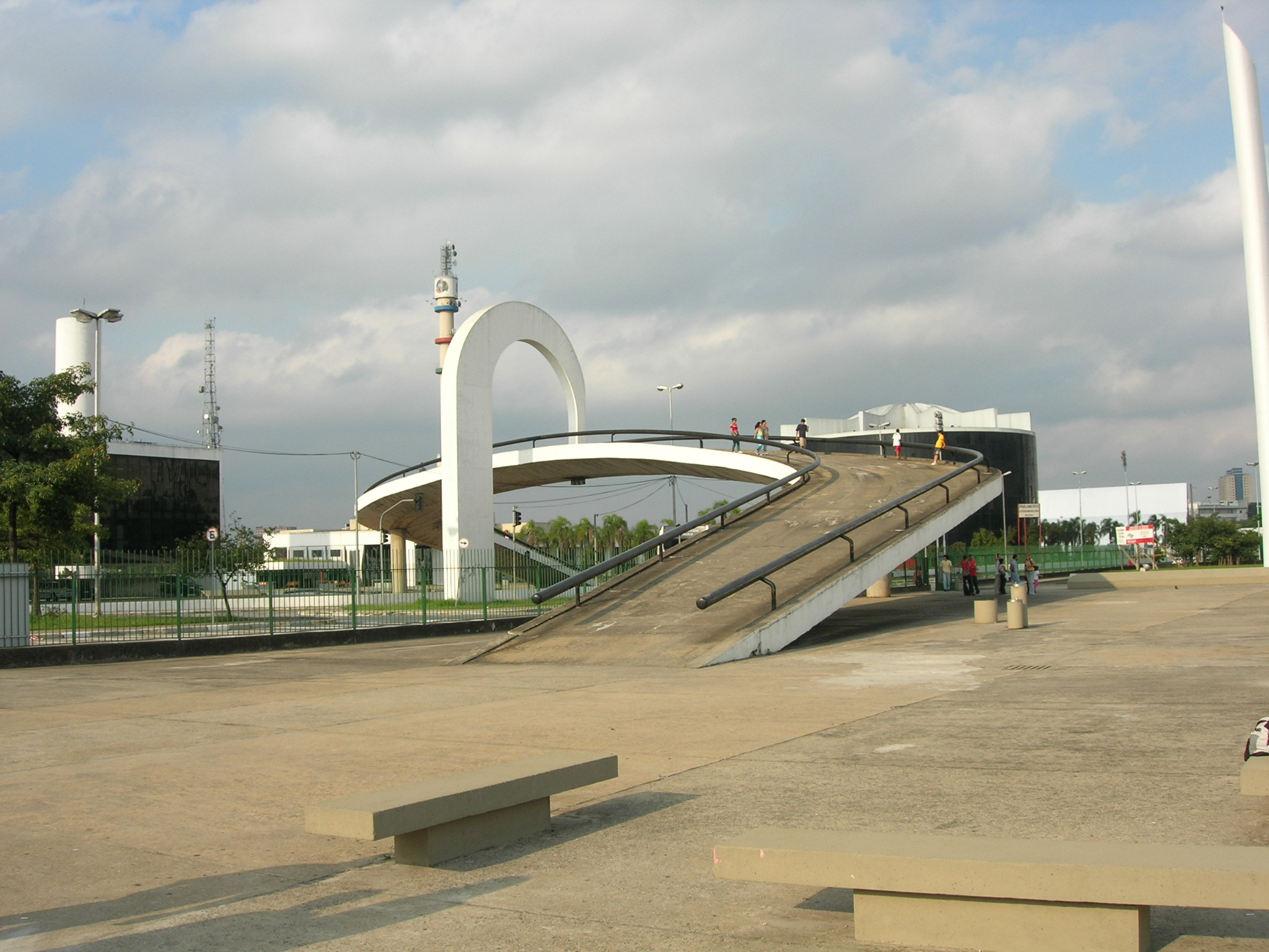 Picture taken by Usuário:Gabrielt4e. Shot of the Passarela of Memorial da América Latina - São Paulo, SP. Foto tirada por Usuário:Gabrielt4e. Imagem do passarela do Memorial da América Latina - São Paulo, SP.